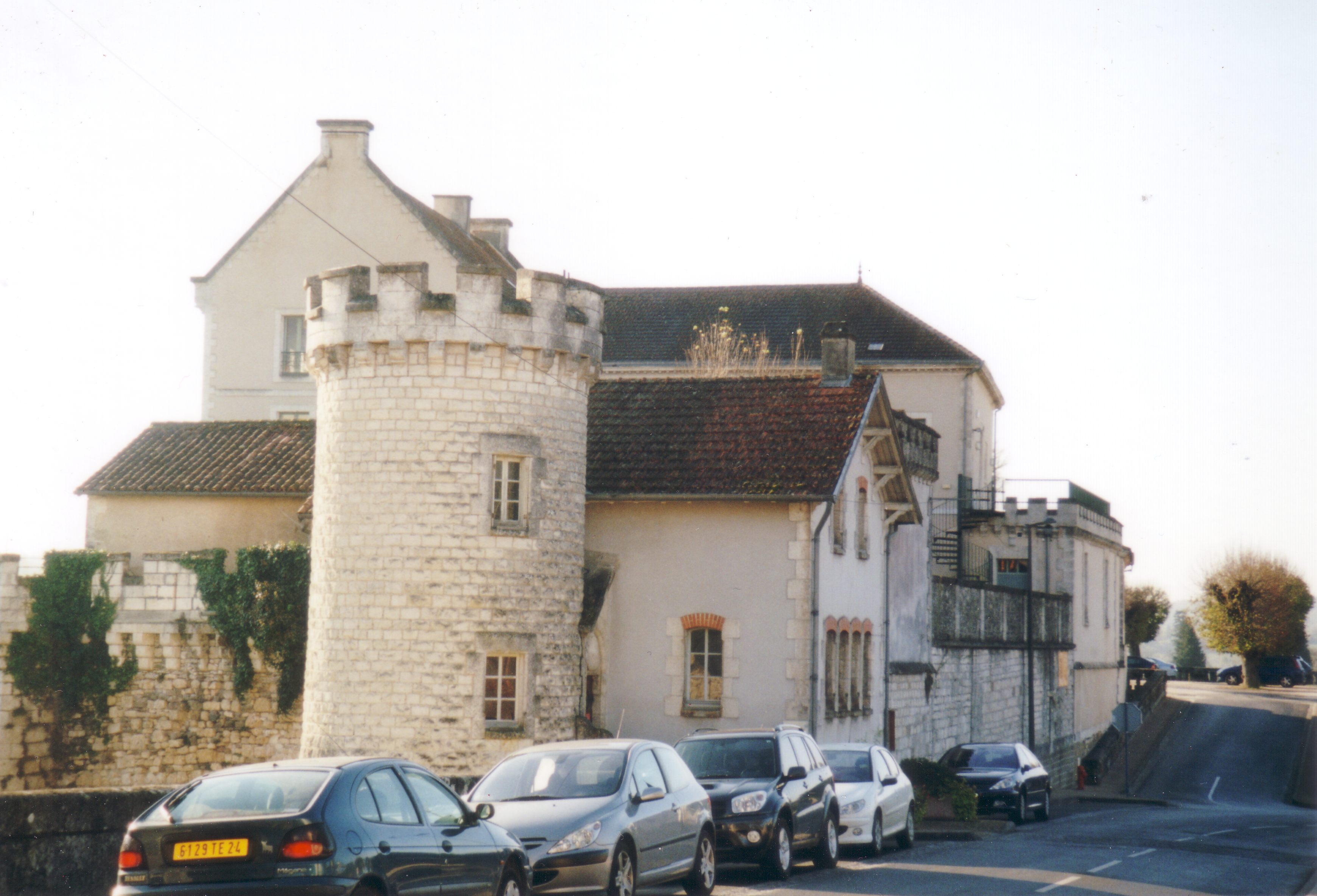 La tour ronde sur le rempart de Nontron. Elle héberge actuellement (2007) l'école de musique.